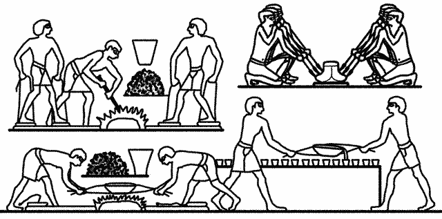 Egyptian metal workers